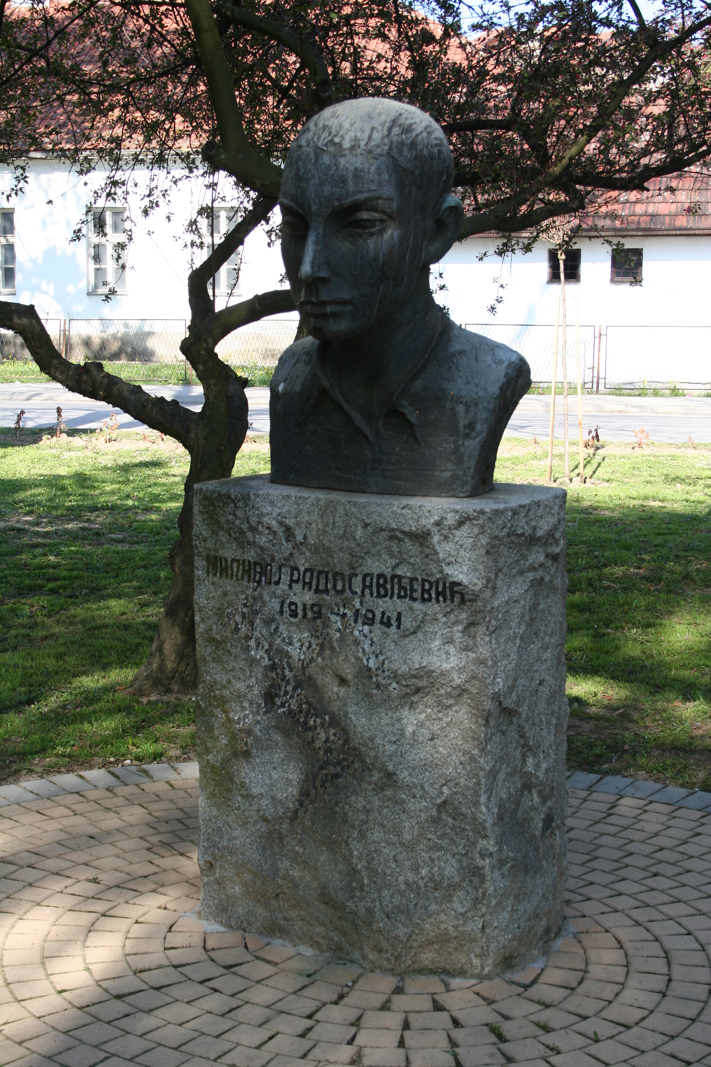 Spomenici, Valjevo